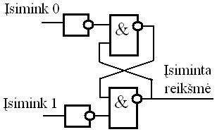 RS trigeris.